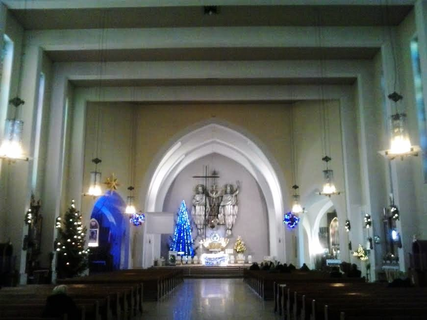 Wnętrze dębieckiego kościoła Świętej Trójcy w Poznaniu.